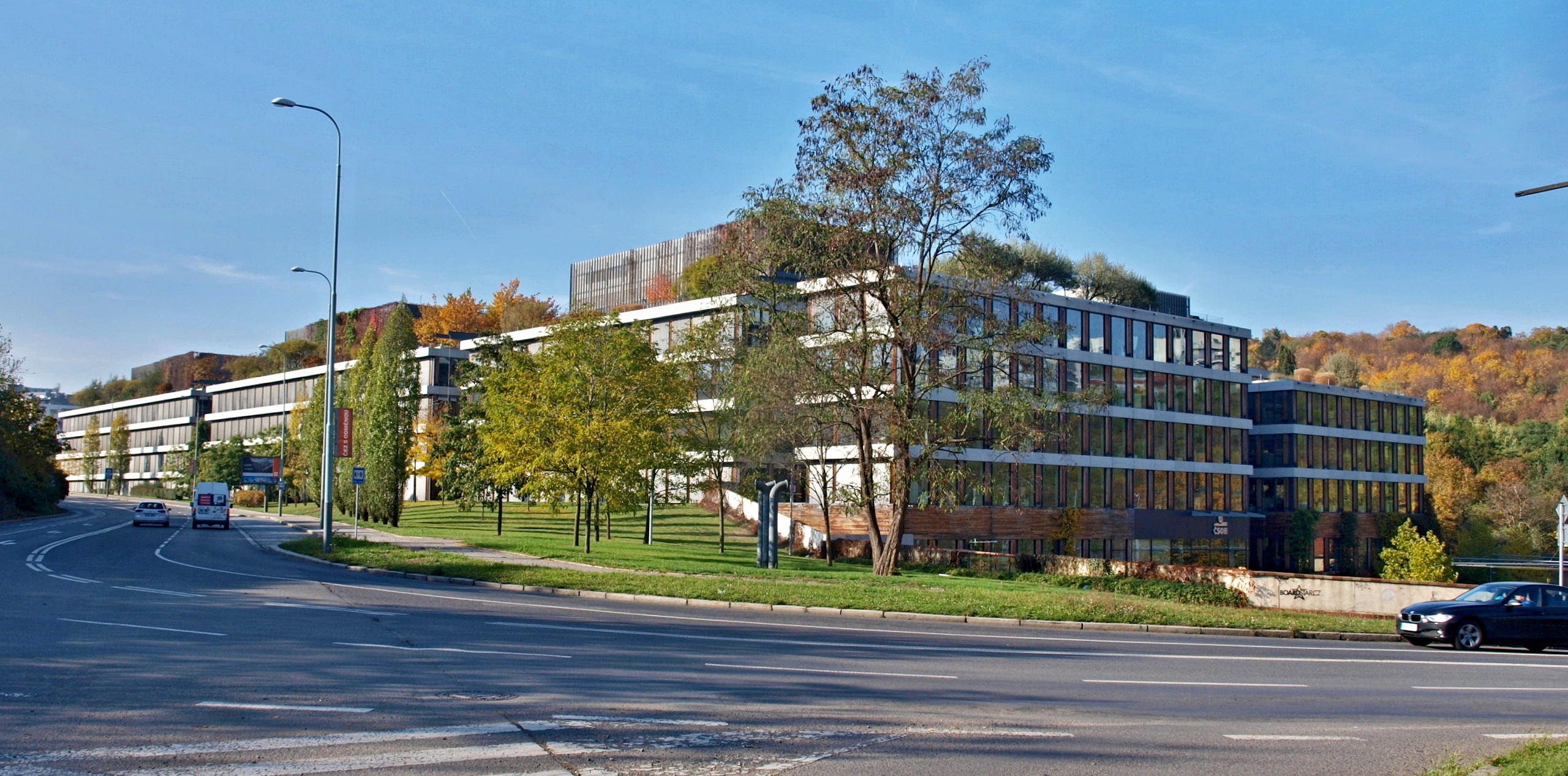 Hlavní budova ČSOB Radlická